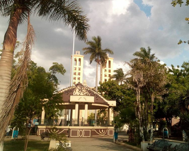 Centro en Ciudad Mante, Tamaulipas.